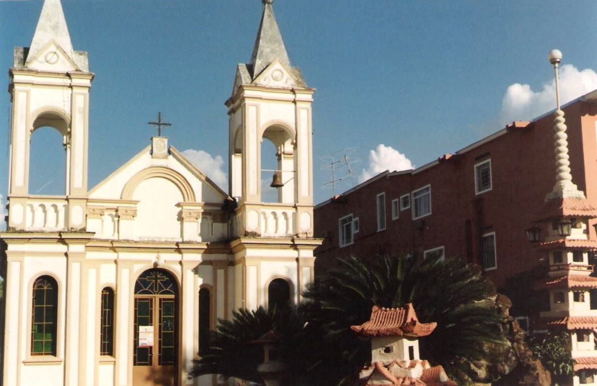 Descrição: Igreja Santo Antônio, em Três Lagoas, Mato Grosso do Sul, Brasil. 2007.